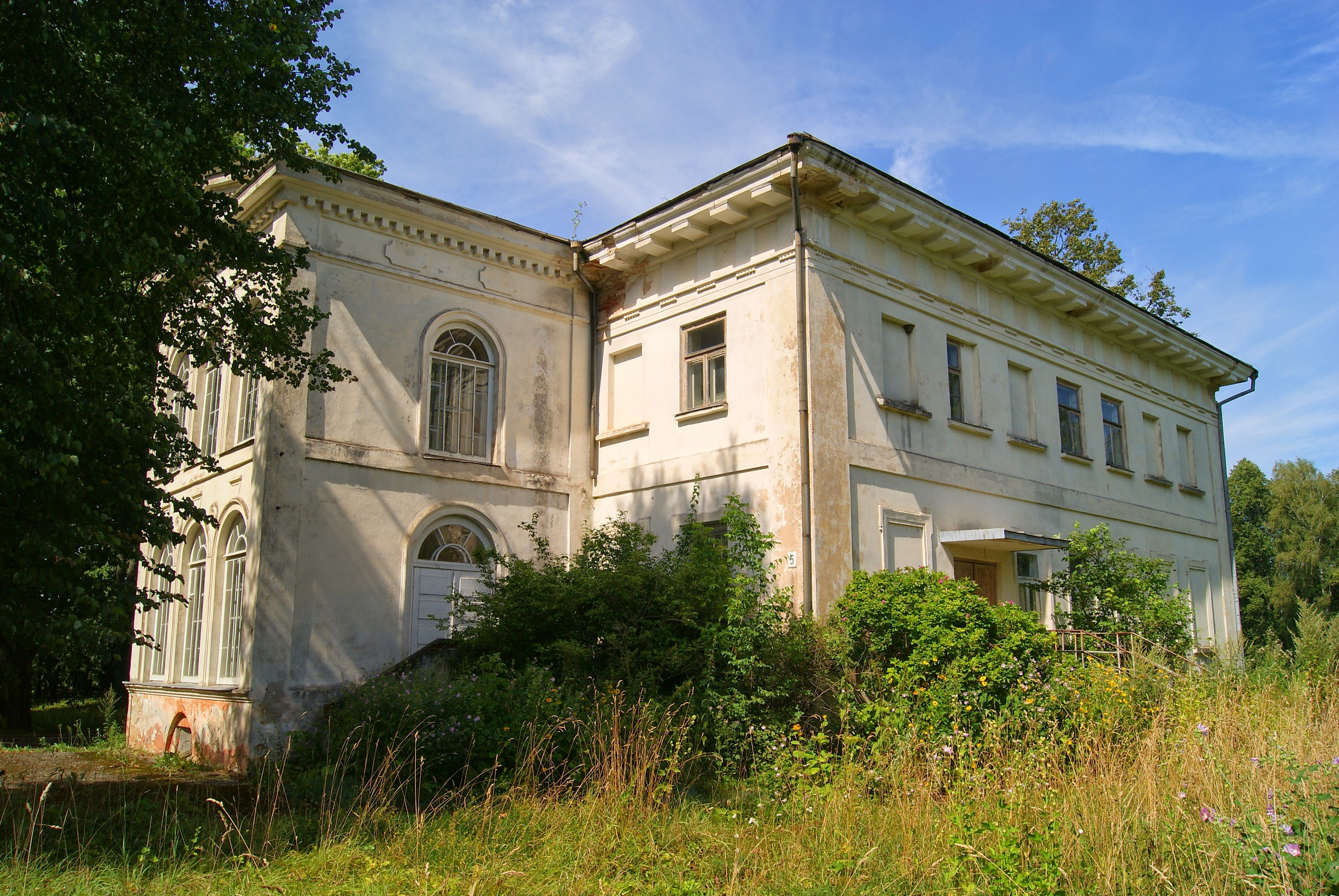 Antašava manor AD1816